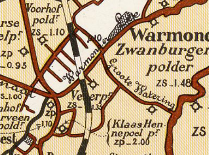 Veerpolder